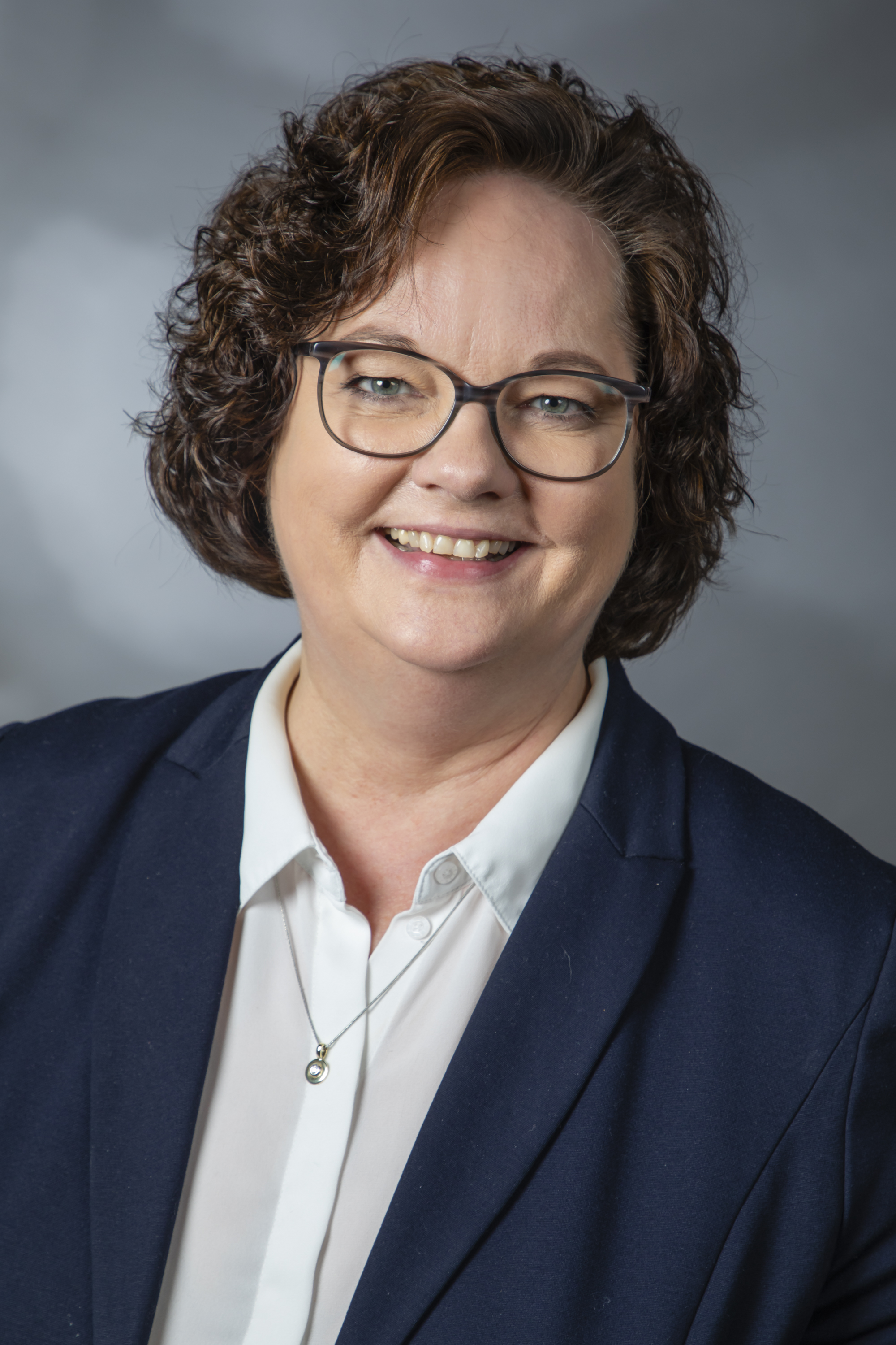 Andrea Stullich Wikipedia-Landtagsprojekt NRW 2019 22 March 2019 in DüsseldorfThis file was taken during the project “Landtag Nordrhein-Westfalen 2019” (German). Organisation: Olaf KosinskyPhotography: Foto-AG Gymnasium Melle: Karsten Mosebach, Anna Borchert, Lara Diekmann, Marieke Eckjans, Neele Grieger, Charlotte Meyran, Carolin Möller, Leoni Potts, Alicia Wulbusch Usage information If you need more information how to use this file, please send an email to . The making of this document was supported by Skillshare. Personality rights warningAlthough this work is freely licensed or in the public domain, the person(s) shown may have rights that legally restrict certain re-uses unless those depicted consent to such uses. In these cases, a model release or other evidence of consent could protect you from infringement claims.